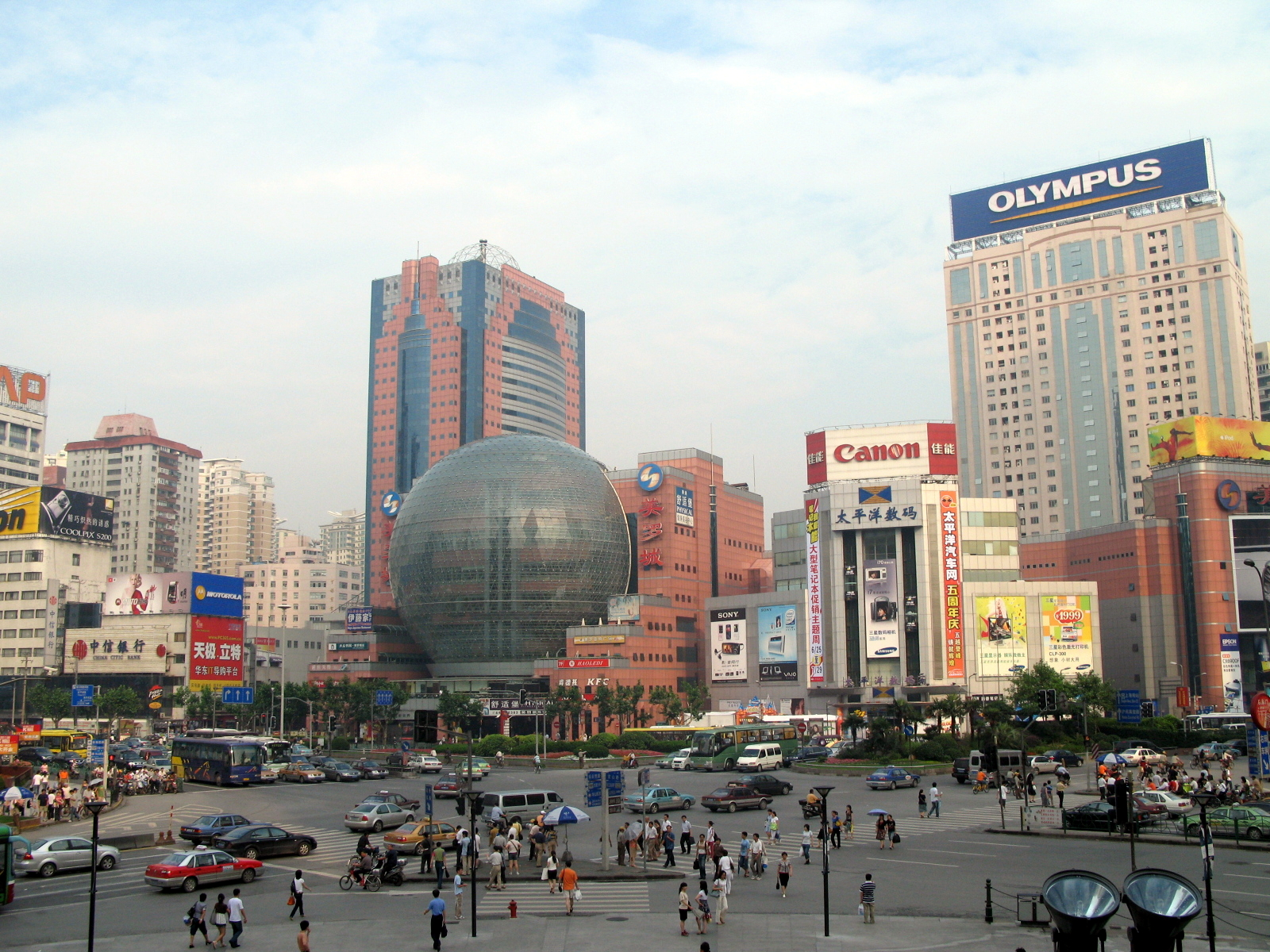 上海徐家匯 Shanghai Xujiahui